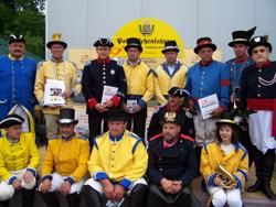 Postillione zum Postkutschentreffen 2008 in Grillenburg